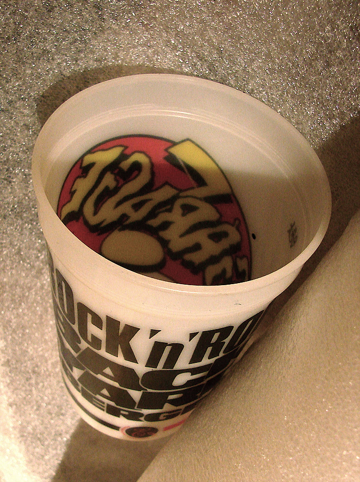 Garage, drikkebæger fra værtshus i Bergen